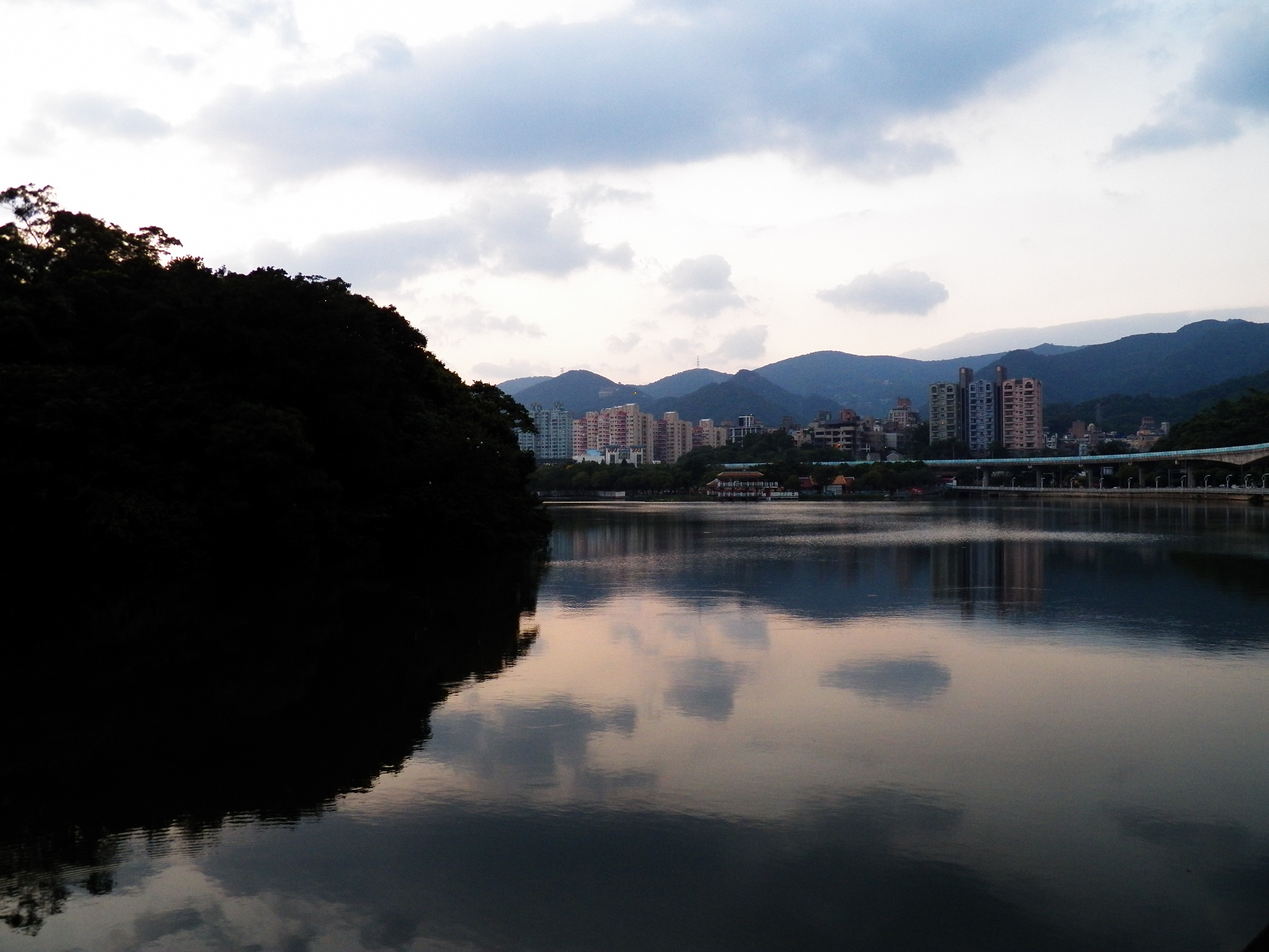 由湖南北望薄暮的大湖公園與捷運內湖線。